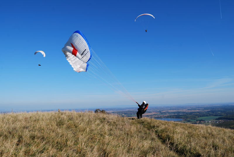 Paraglide, Pálava, Mikulov